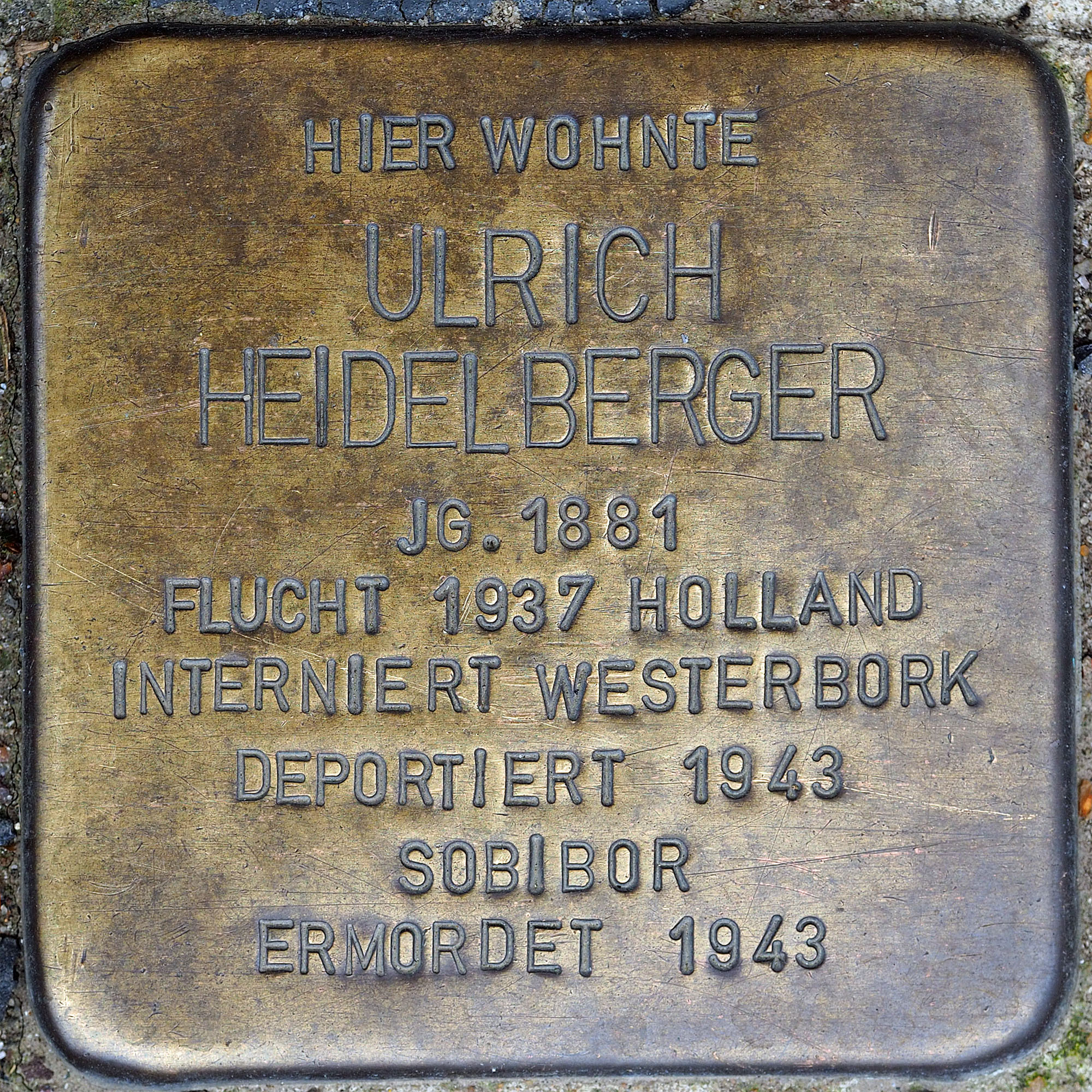 Stolpersteine MG: Heidelberger, Ulrich